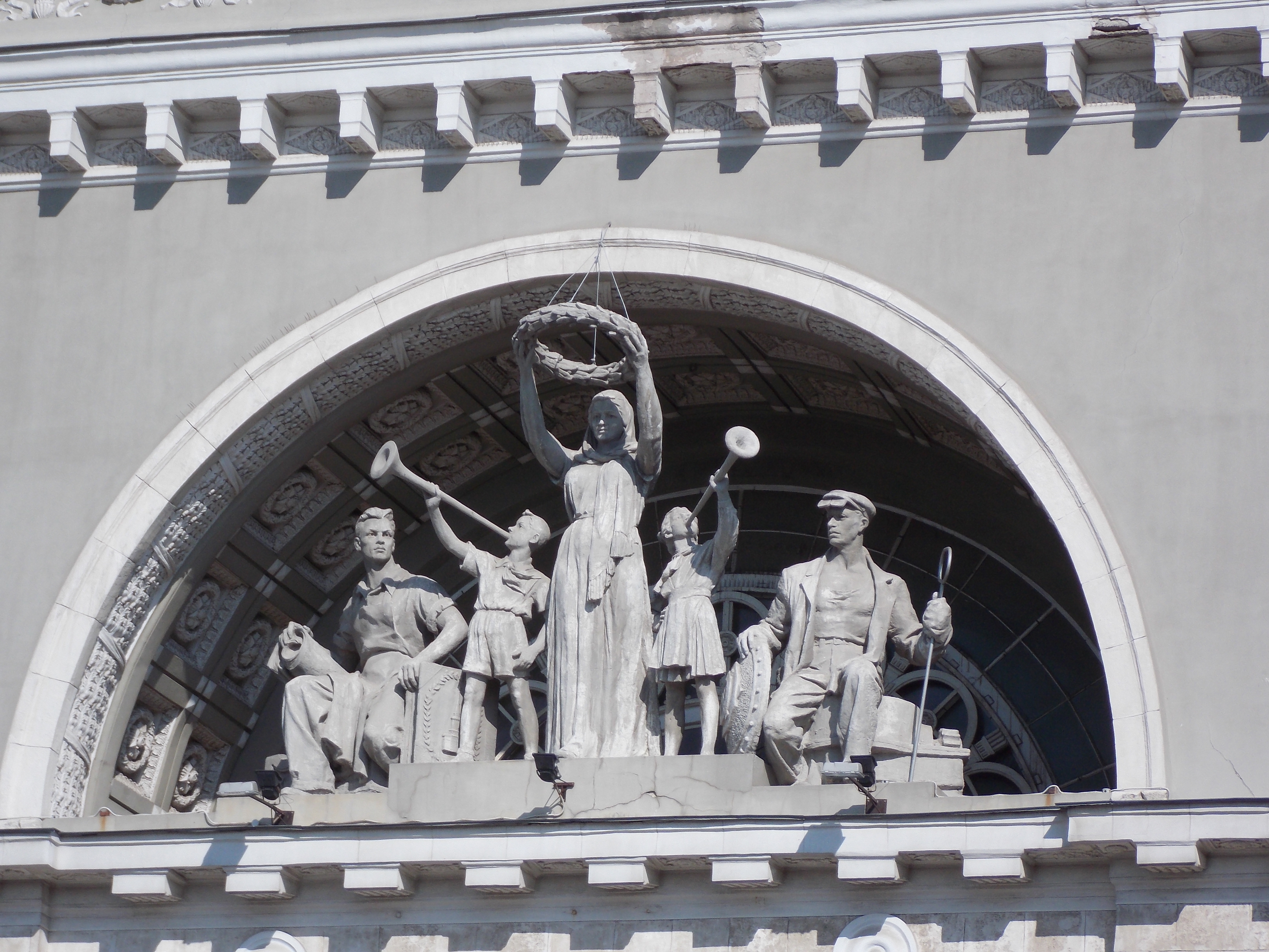 Скульптурная группа «Апофеоз труда» на фасаде железнодорожного вокзала станции Волгоград-I (Привокзальная площадь, 1, Волгоград). Историческая версия до реставрации 2014 года.